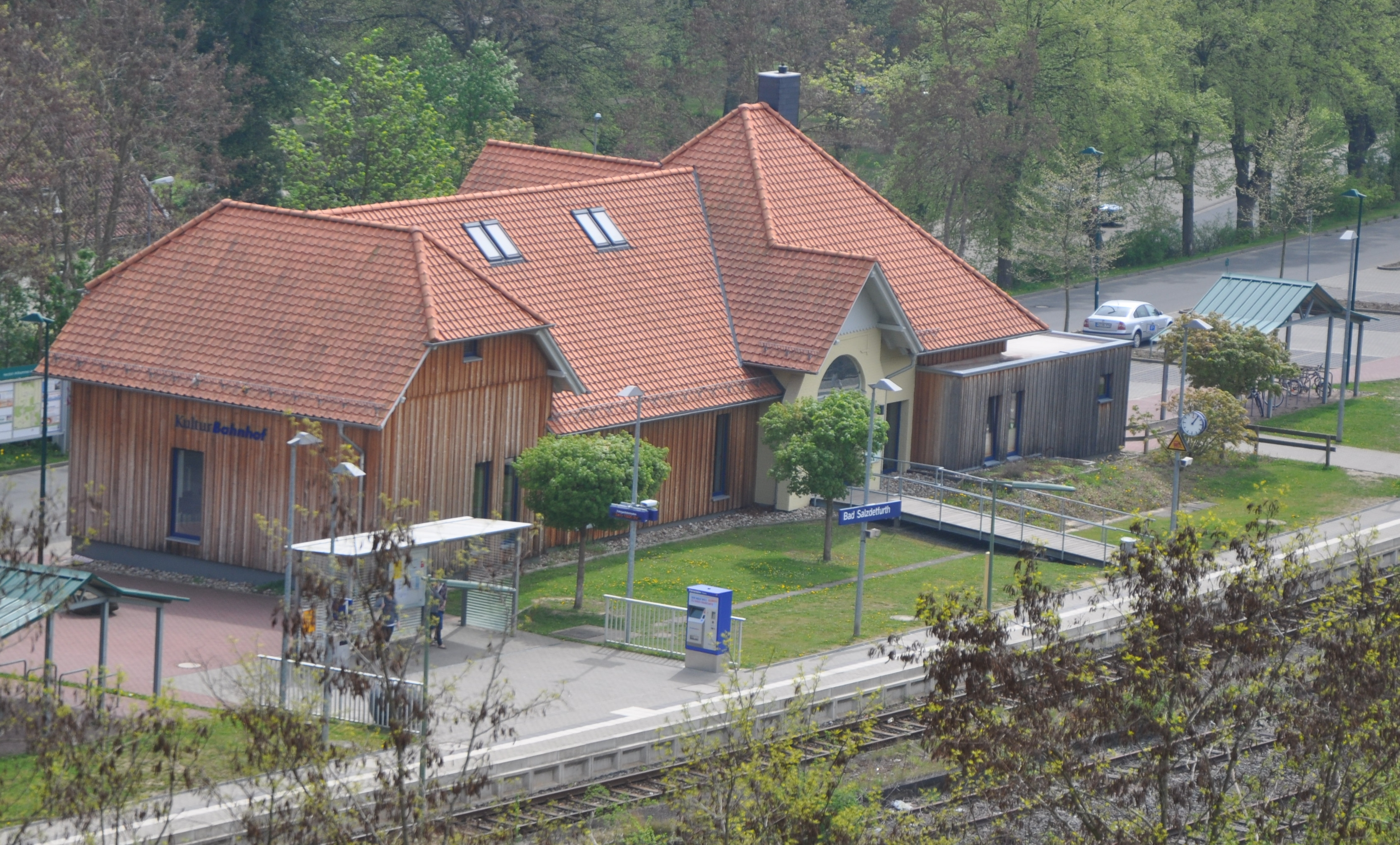 Blick auf den Kulturbahnhof Bad Salzdetfurth